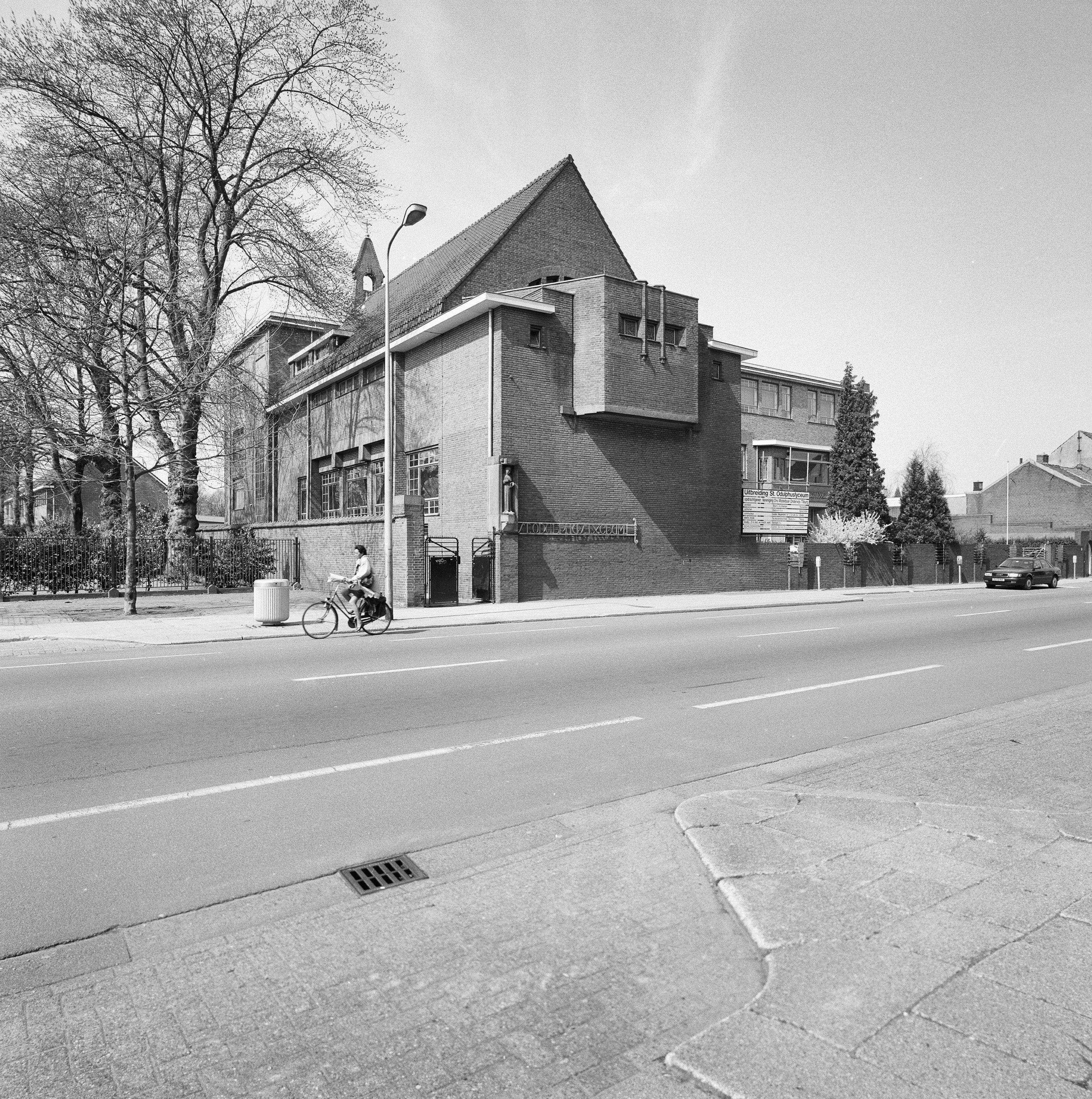 Sint Odolphuslyceum: Overzicht kapel behorend bij het lyceum (opmerking: Gefotografeerd voor MIP Tilburg)